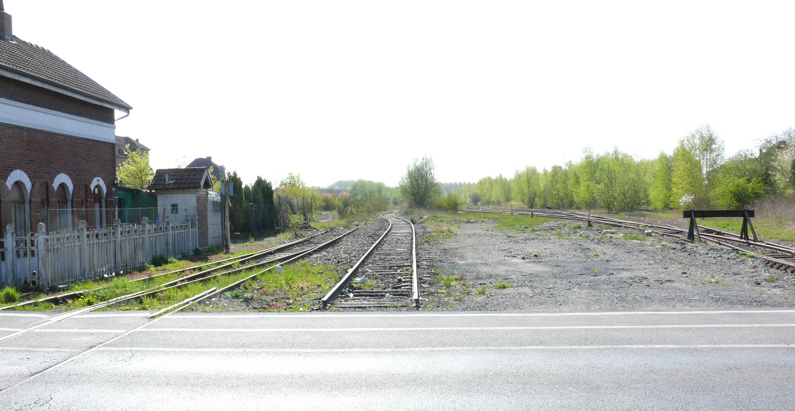 Quiévrechain : les vestiges de la ligne internationale Valenciennes - Mons (Ligne 97 de la SNCB) à Blanc-Misseron (ancien passage à niveau de la rue des Déportés